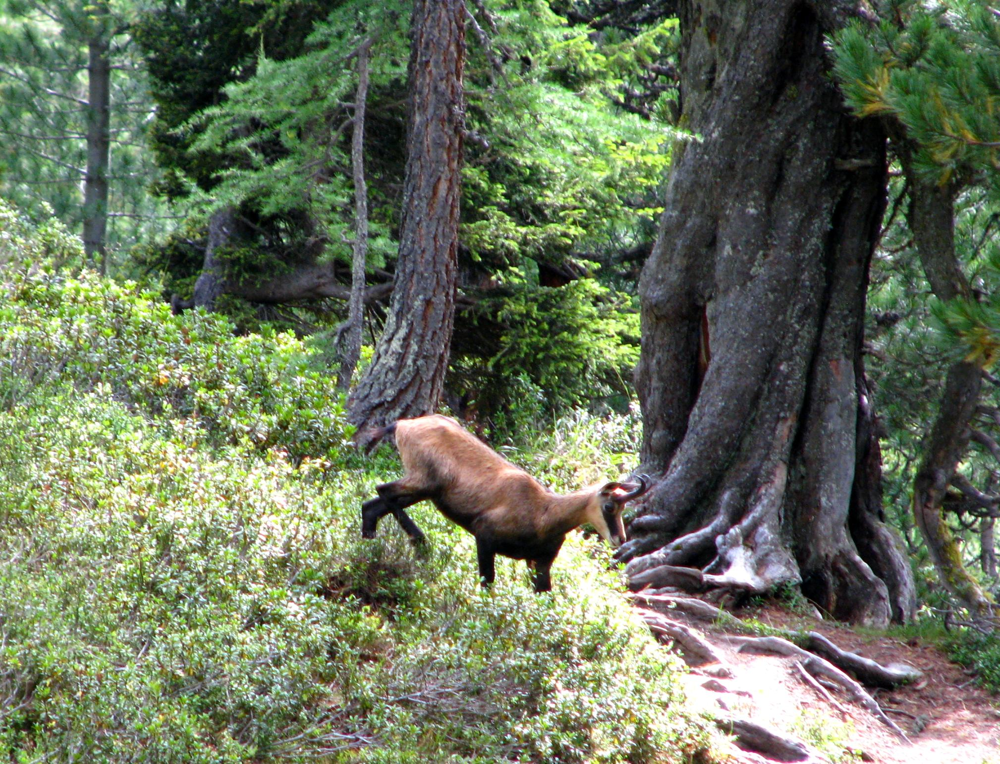 Gämse Rupicapra rupicapra im Aletschwald bei Brig.